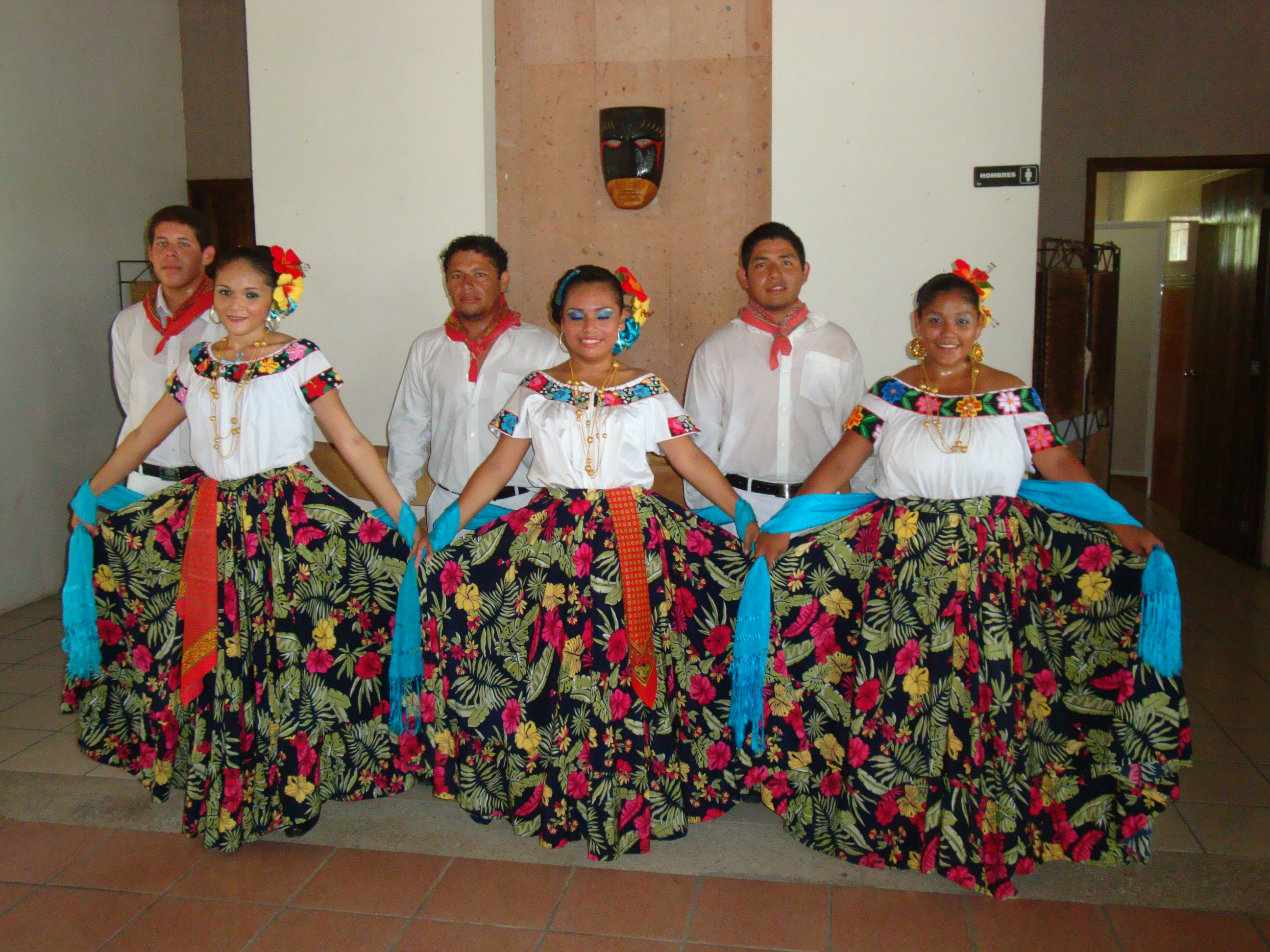 Integrantes del Ballet Folclórico Municipal de Centla, estado de Tabasco, México.